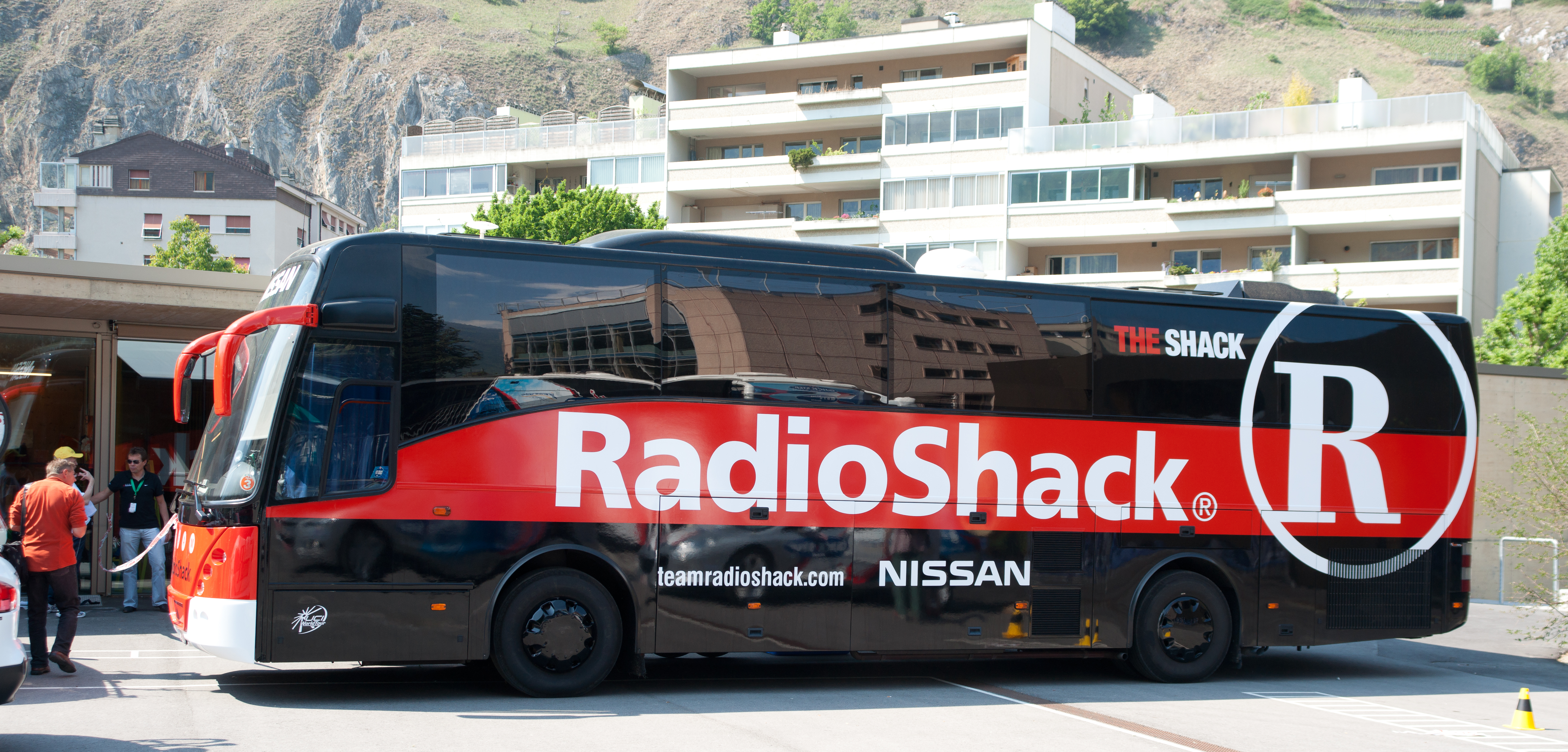 Contre la montre - Romandie 2010